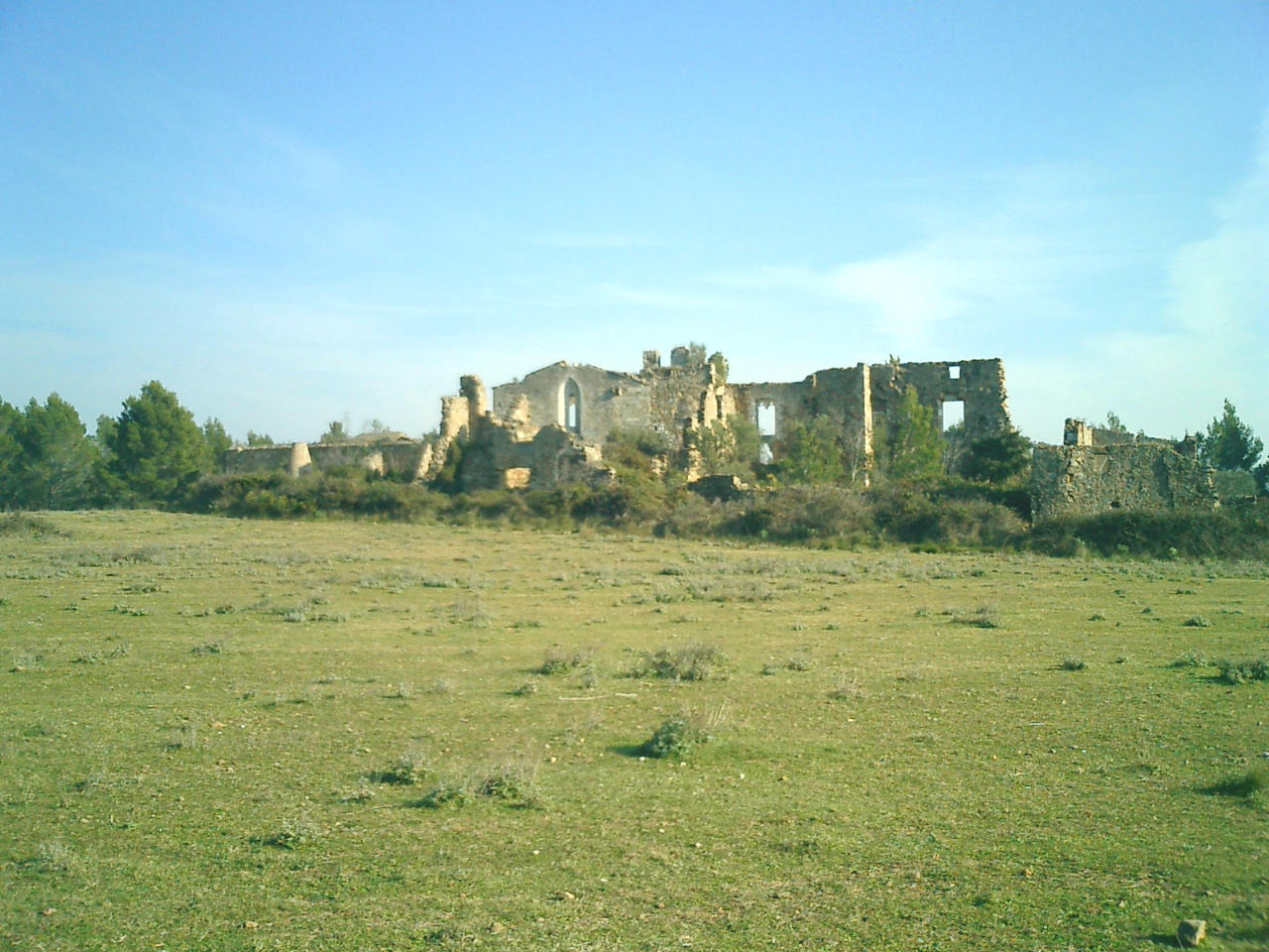 Vista de les ruines de Santa Maria del Roure